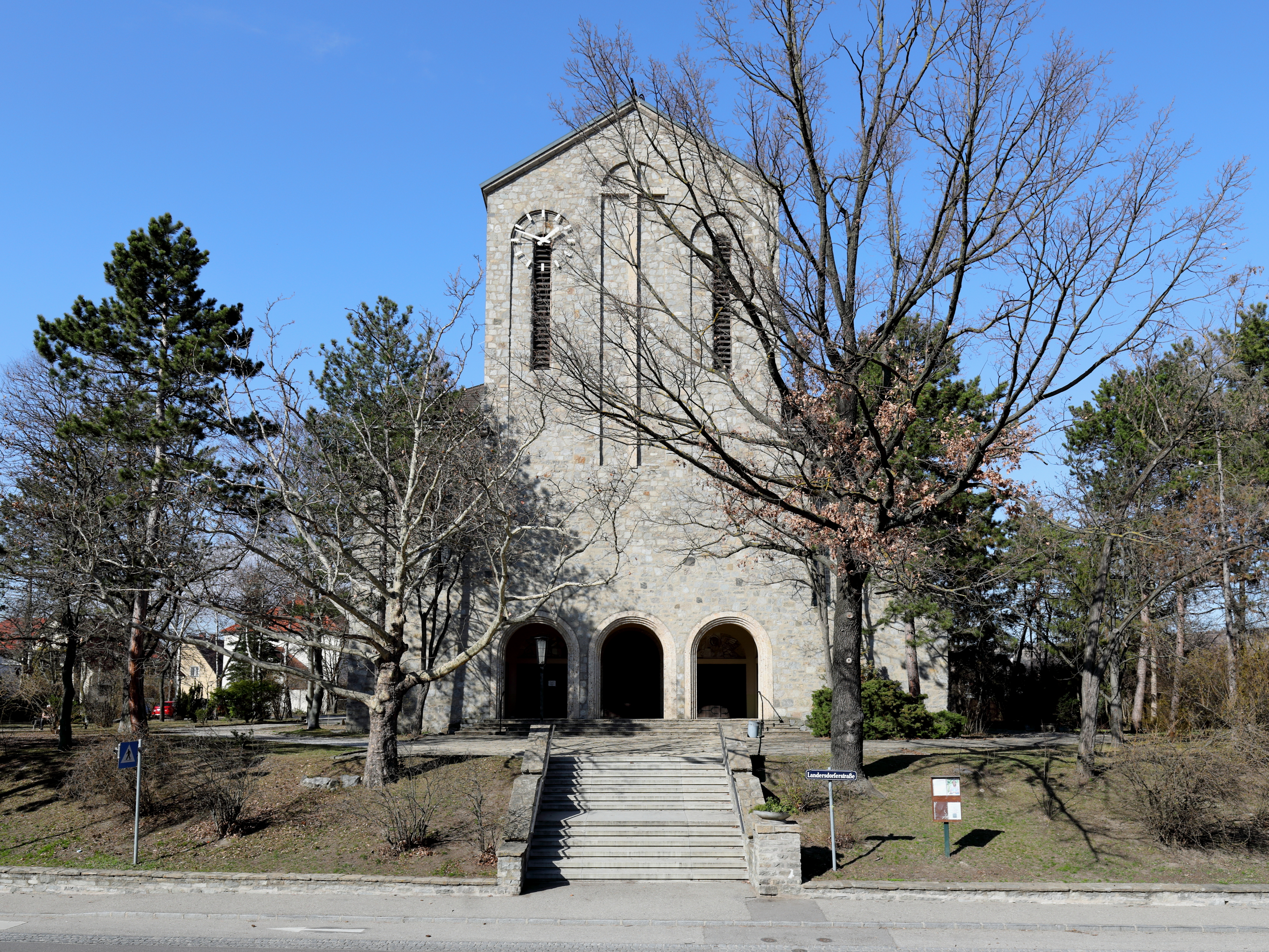 Südansicht der röm.-kath. Pfarrkirche hl. Maria Königin des Weltalls, hl. Severin, hl. Theresia vom Kinde in Lerchenfeld, ein Ortsteil der niederösterreichischen Stadtgemeinde Krems an der Donau. Die Marienkirche wurde ab 1955 nach Plänen des Architekten Julius Bergmann (1896–1969) errichtet und 1958 geweiht.